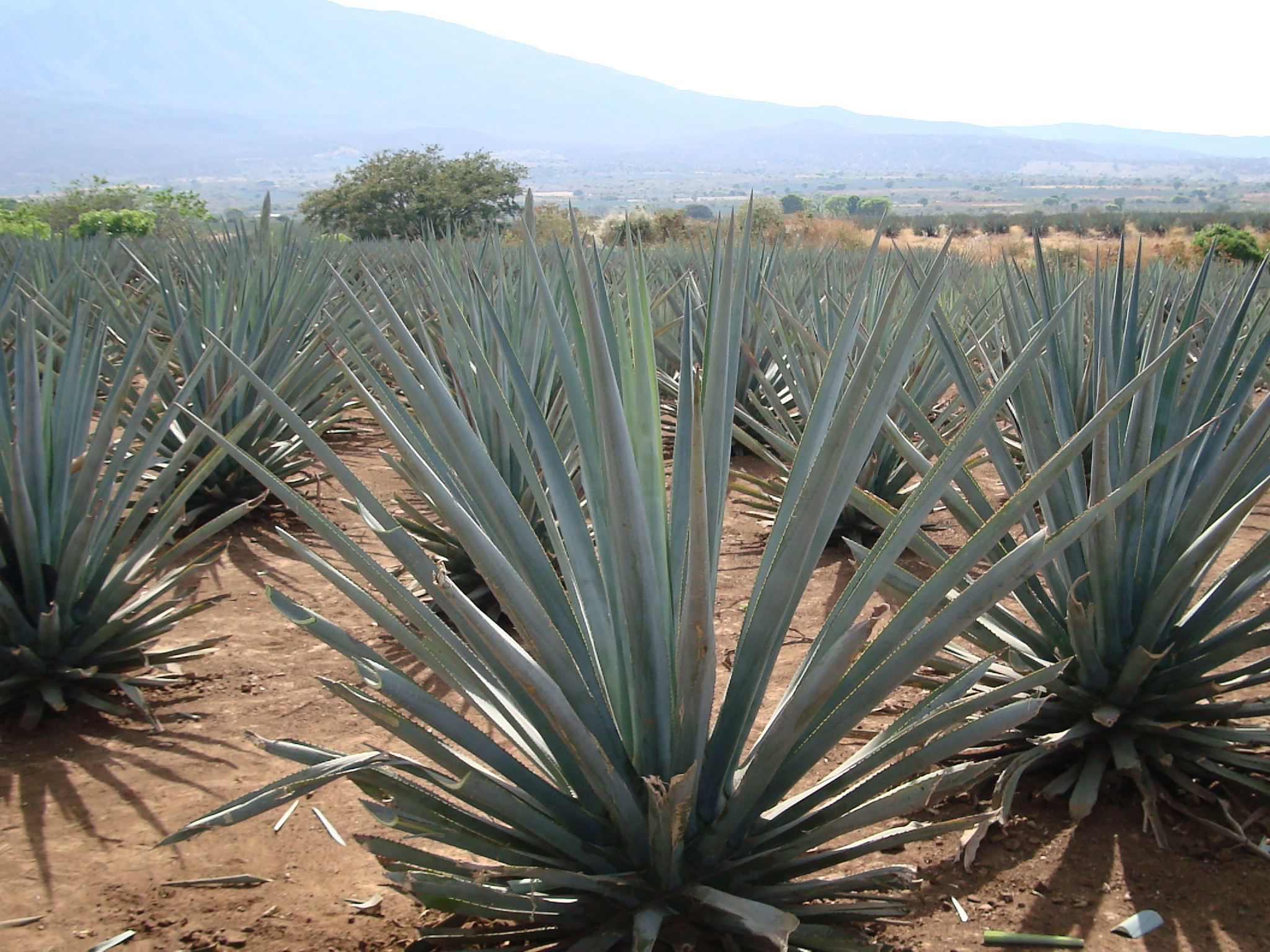 Blue Agave, Tequila, Mexico